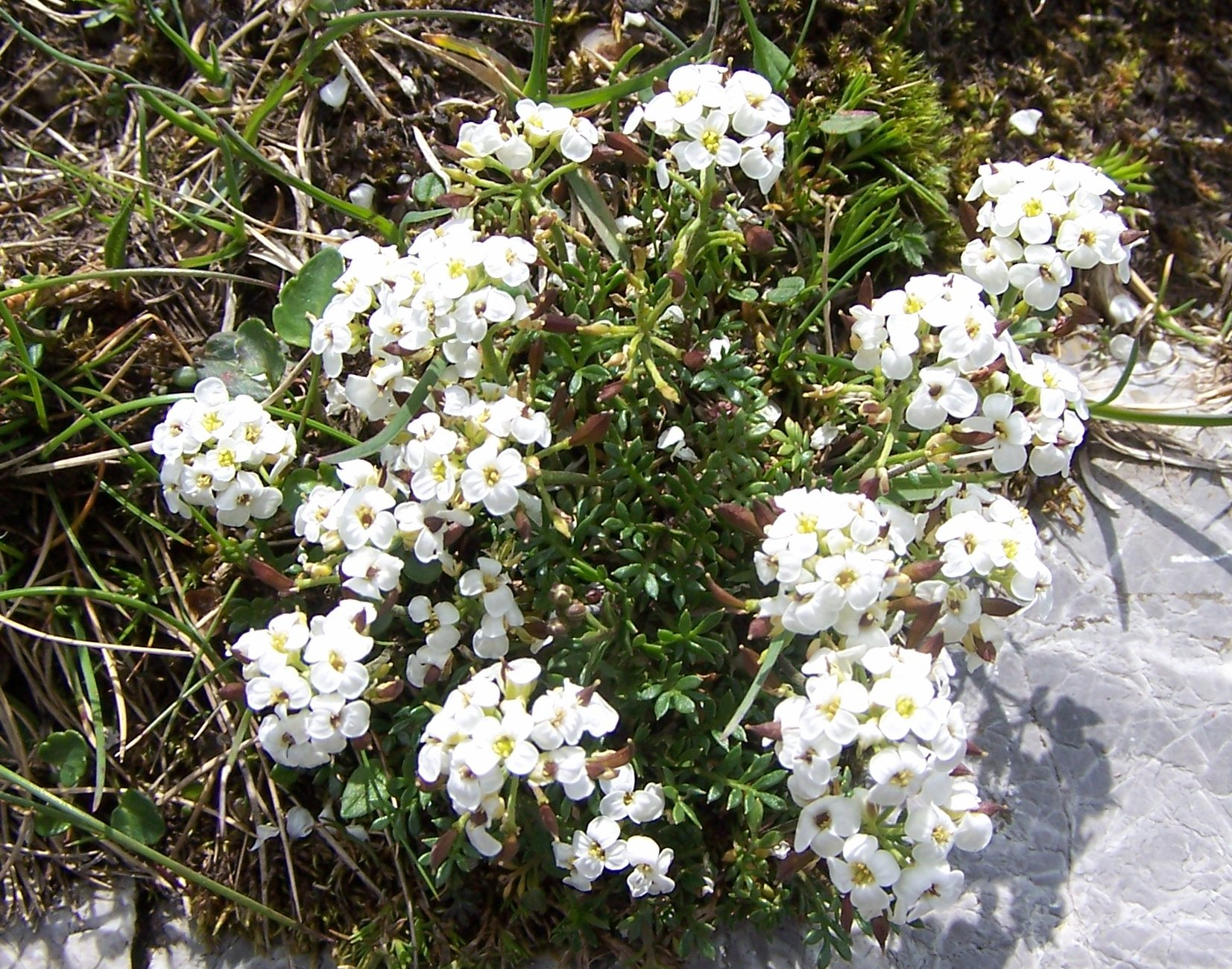 Hutchinsia alpina (pl. rzeżuszka alpejska), habitat: West Tatra Mountains, Kobylarzowy Żleb